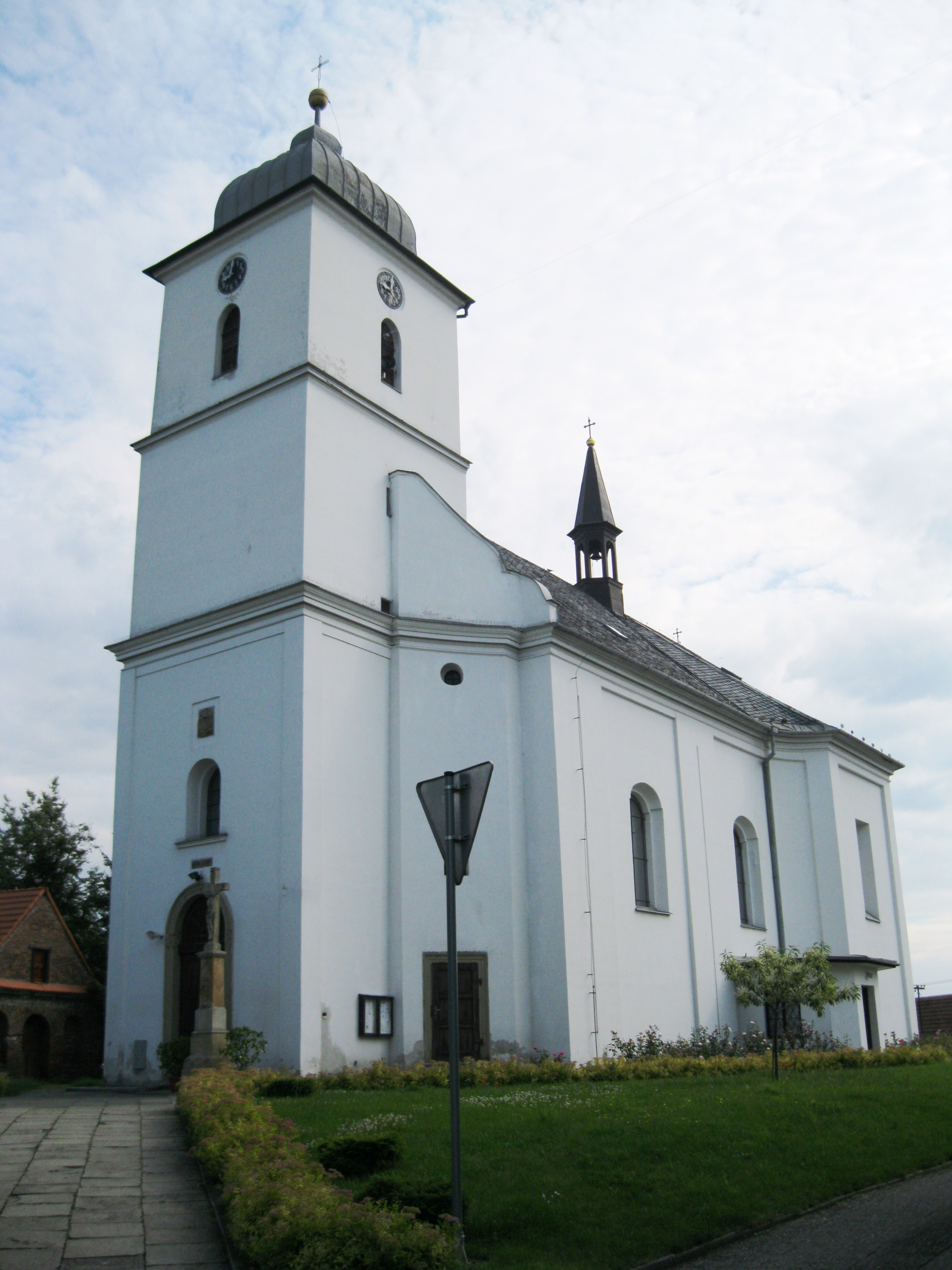 Kostel sv. Jana Křtitele (Charváty), Charváty